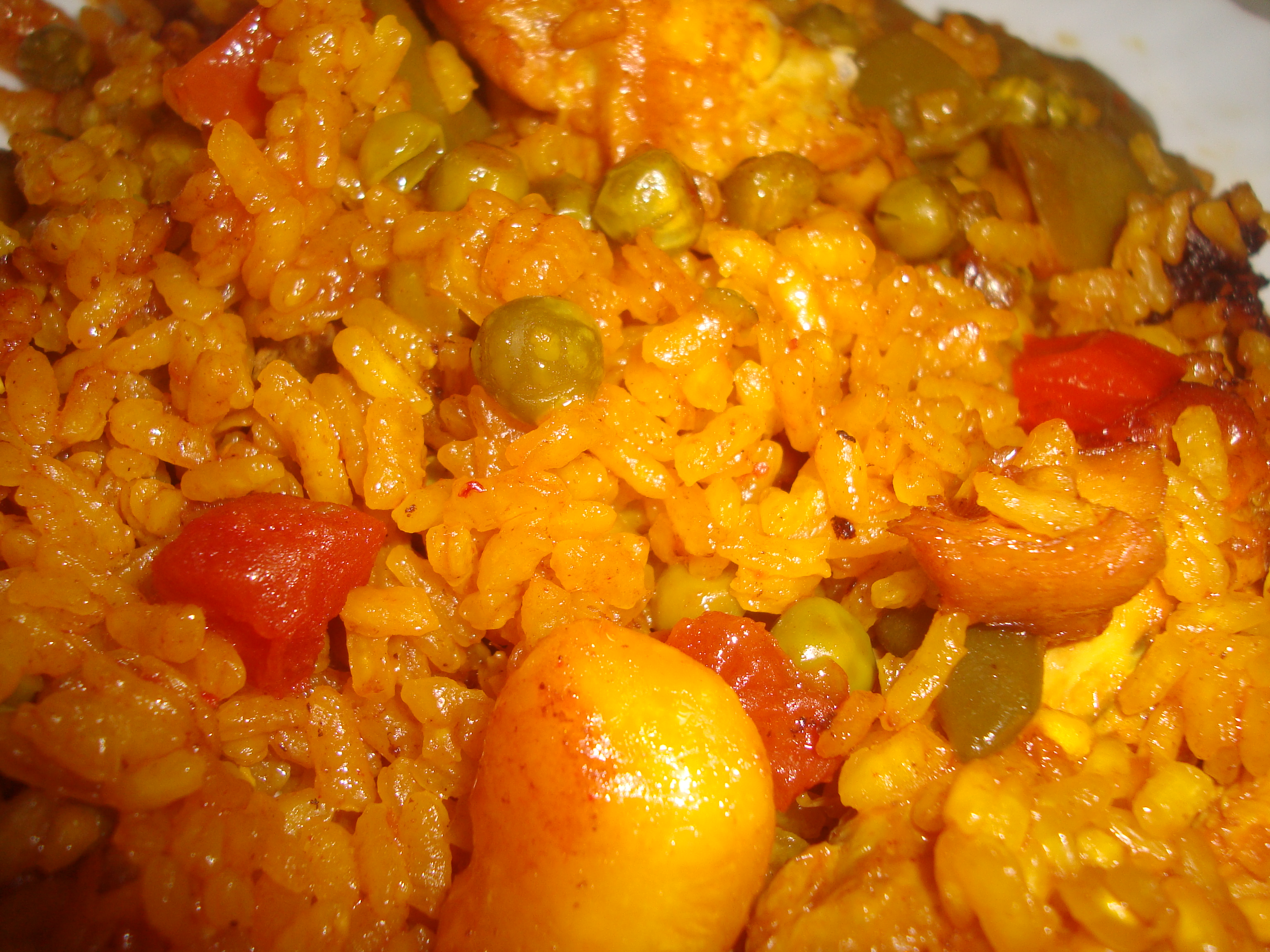 Paella valenciana.